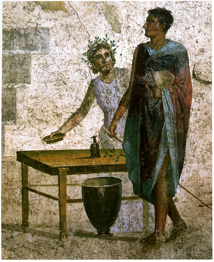 Jason entrainant les argonautes à la recherche de la Toison d'or.